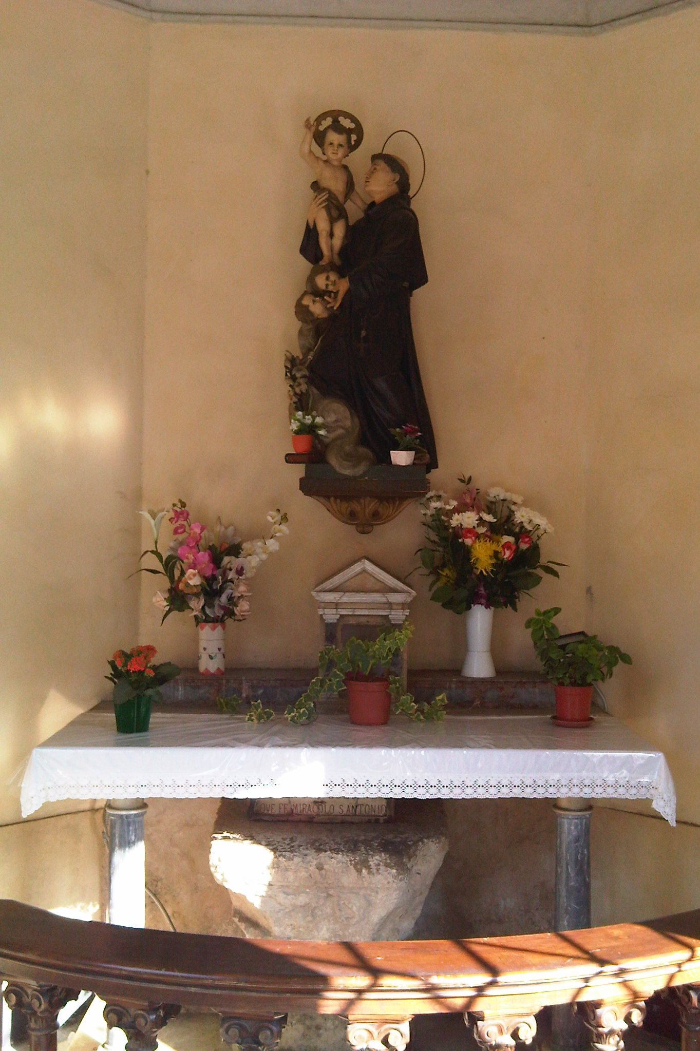 Interno del tempietto riminese dedicato alla memoria del Miracolo eucaristico della mula di Sant'Antonio di Padova